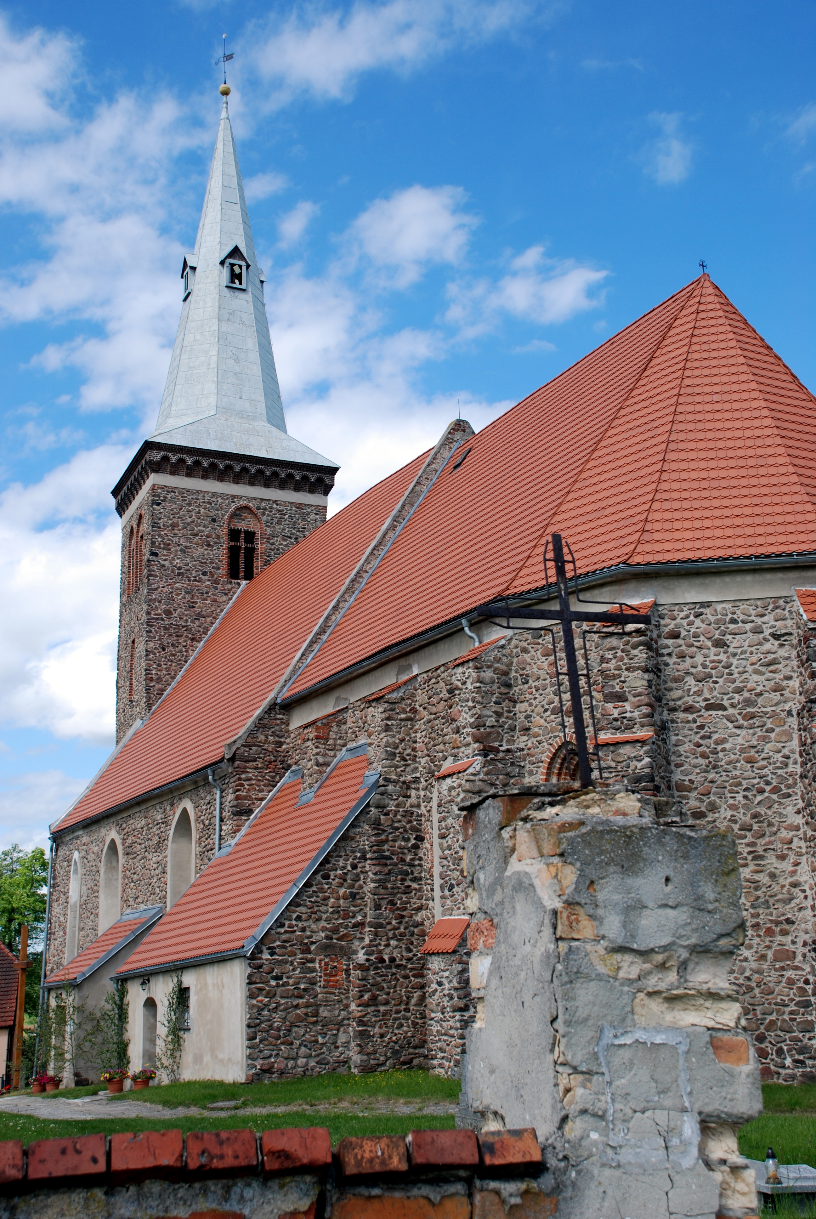 Drożków - kościół parafialny p.w. Podwyższenia Krzyża Św., 2 poł. XIII, XV, XIX